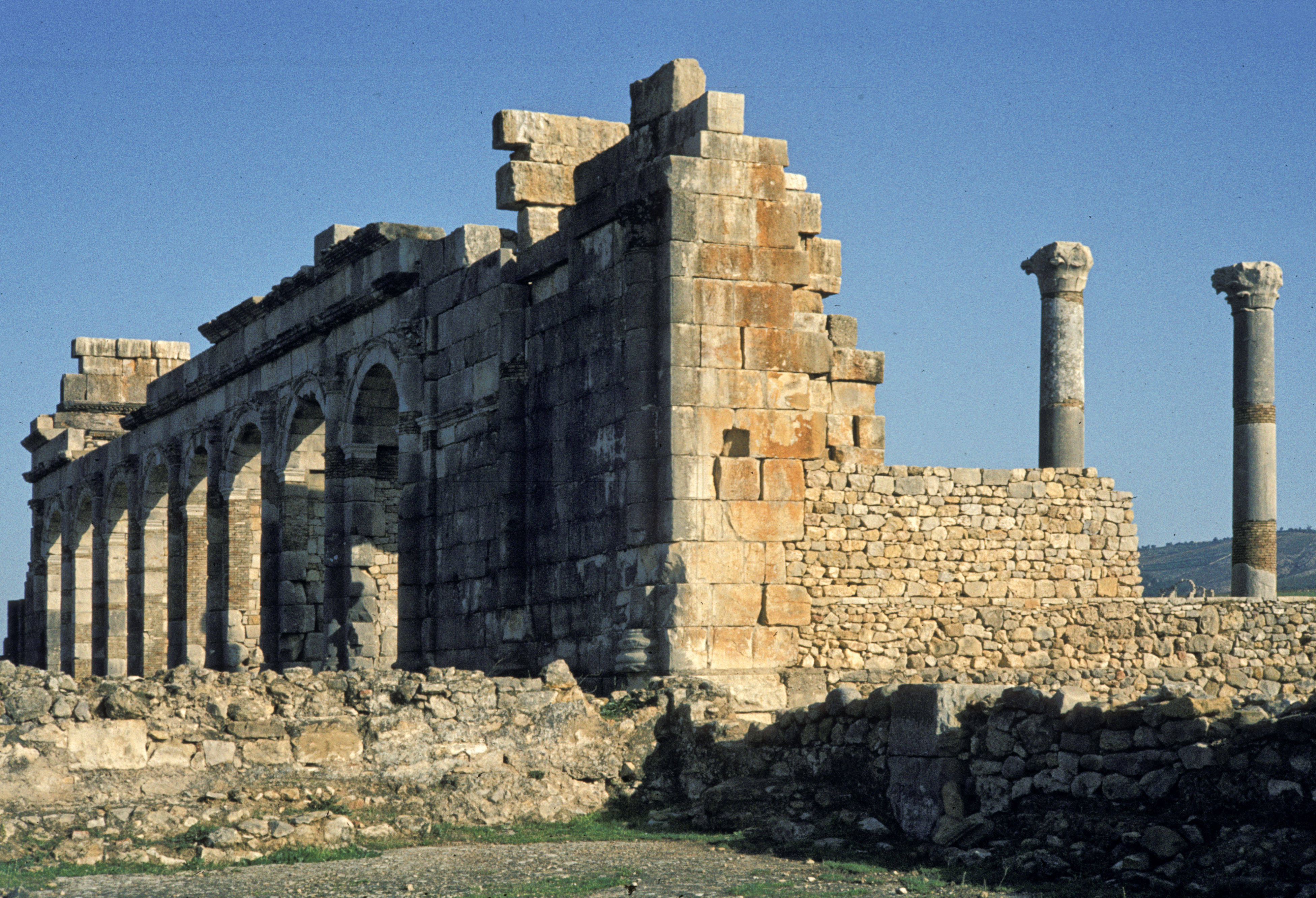 Morocco